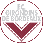 Ehemaliges Wappen von Bordeaux